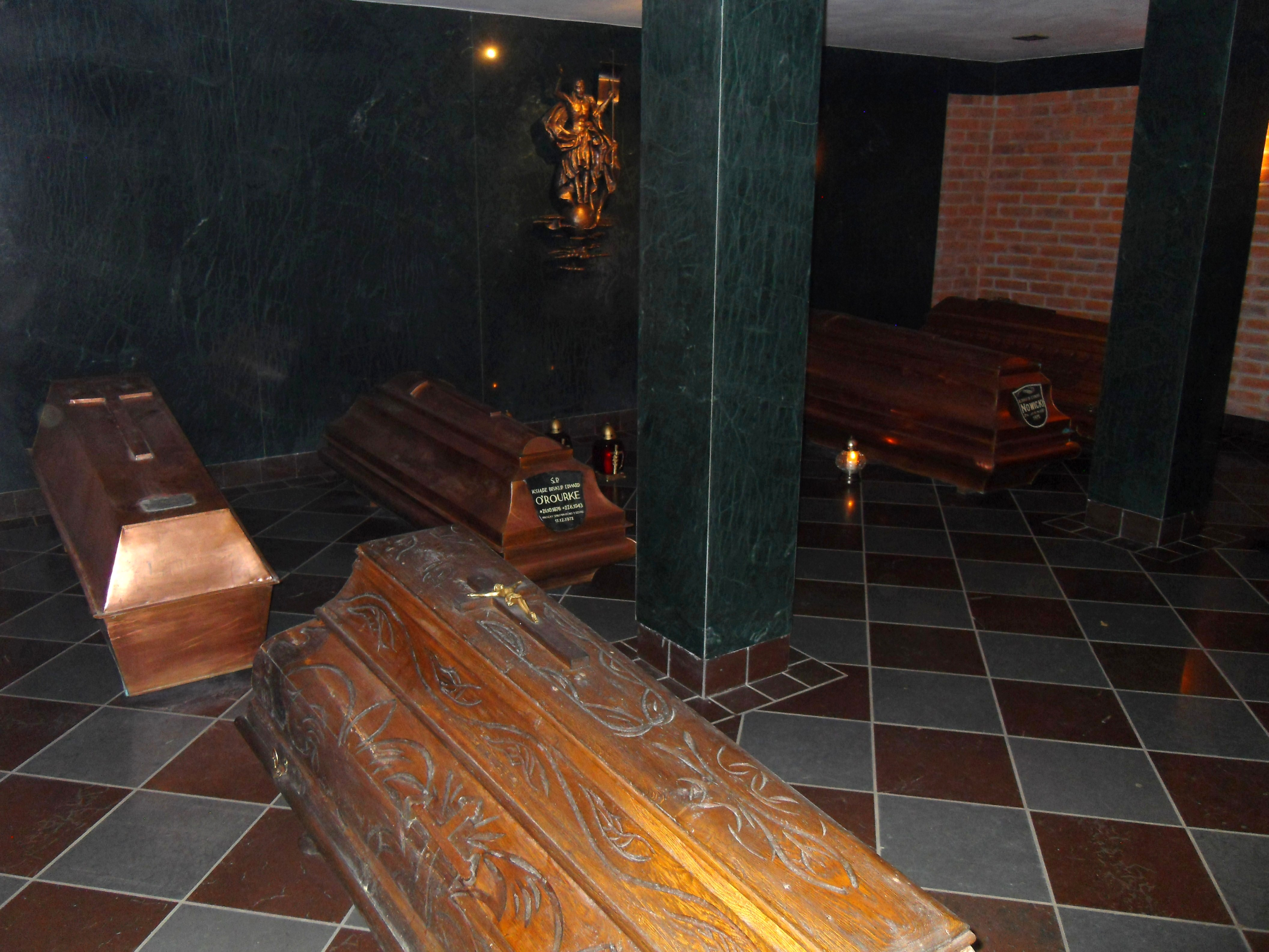 Katedra oliwska, krypta biskupów.